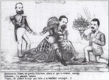 Caricaturas chilenas de la Guerra del Pacífico - Patricio Ibarra Cifuentes: "Durante 1879 el gobierno chileno, debido a la iniciativa del ministro de relaciones exteriores y luego del interior, Domingo Santa María, propuso a Bolivia le entregara Antofagasta a cambio de la sesión de Tacna y Arica. Estas y otras tratativas han sido denominadas por la historiografía chilena como la “Política Boliviana”. El presidente boliviano Hilarión Daza, luego de estudiar la documentación correspondiente, puso en conocimiento de la oferta chilena tanto al Perú como a la Argentina. La caricatura, publicada por El Barbero el 18 de octubre de 1879, muestra a Daza caracterizado como una mujer, siendo cortejada por el jefe de gabinete chileno con un ramo de flores donde se leen los nombres de Tacna y Arica. Por otra parte, el presidente del Perú Ignacio Prado recibe un sobre de manos de Daza, por el cual se impone de las intenciones chilenas, a la par que interpela a Santa María por incitar a la infidelidad de la nación del altiplano."